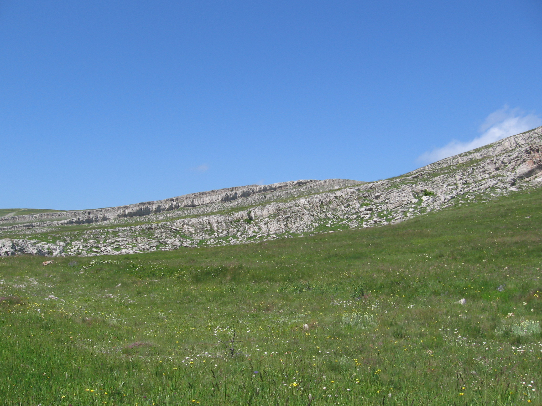 Фото